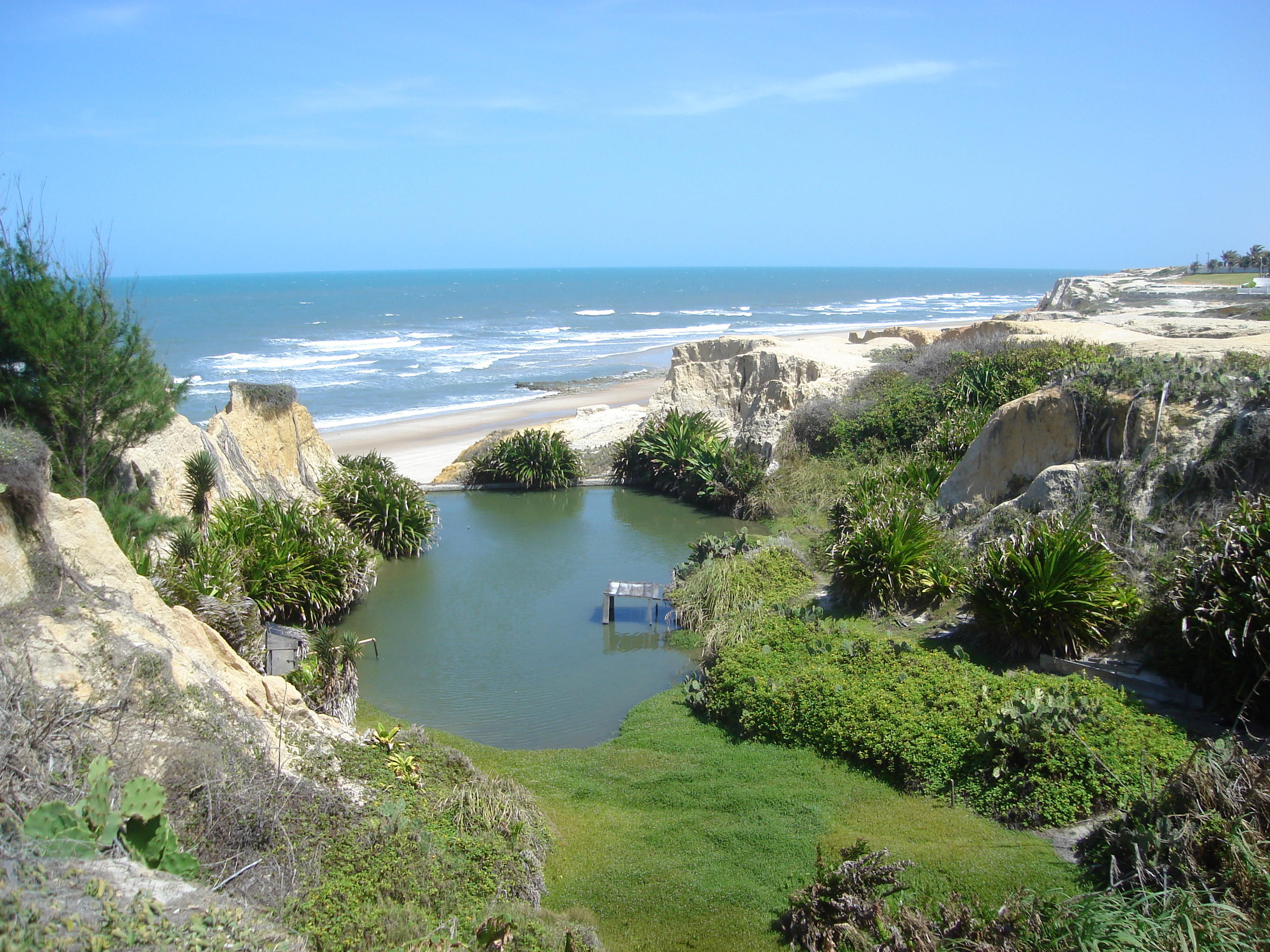 Praia das Fontes, Ceará, Brazil Beaches from Brazil